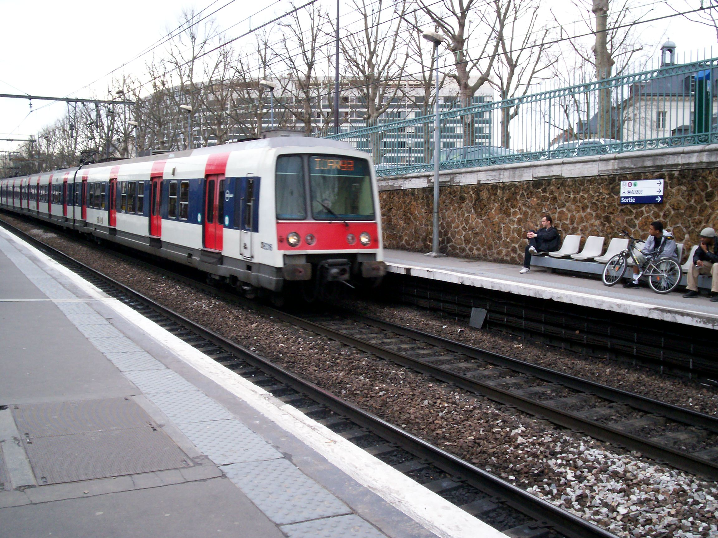 MI 79 - Gare de Denfert-Rochereau